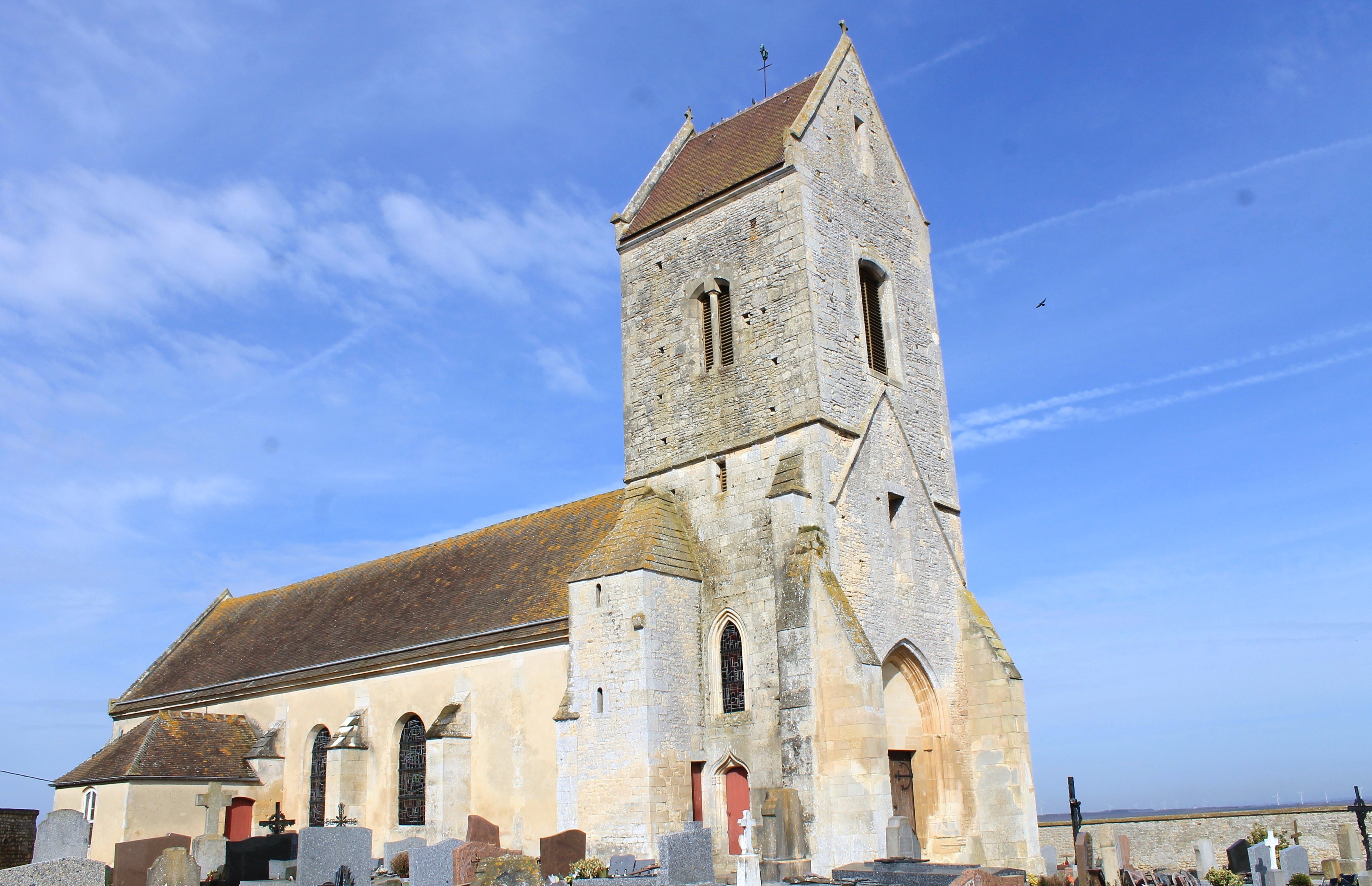 Eglise Notre-Dame Saint-Jean à Estrées-la-Campagne (Calvados)